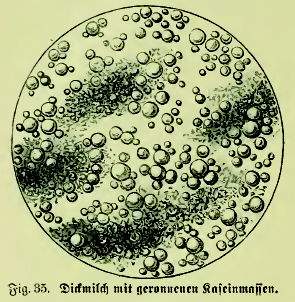 Fig. 35. Dickmilch mit geronnenen Kaseinmassen.